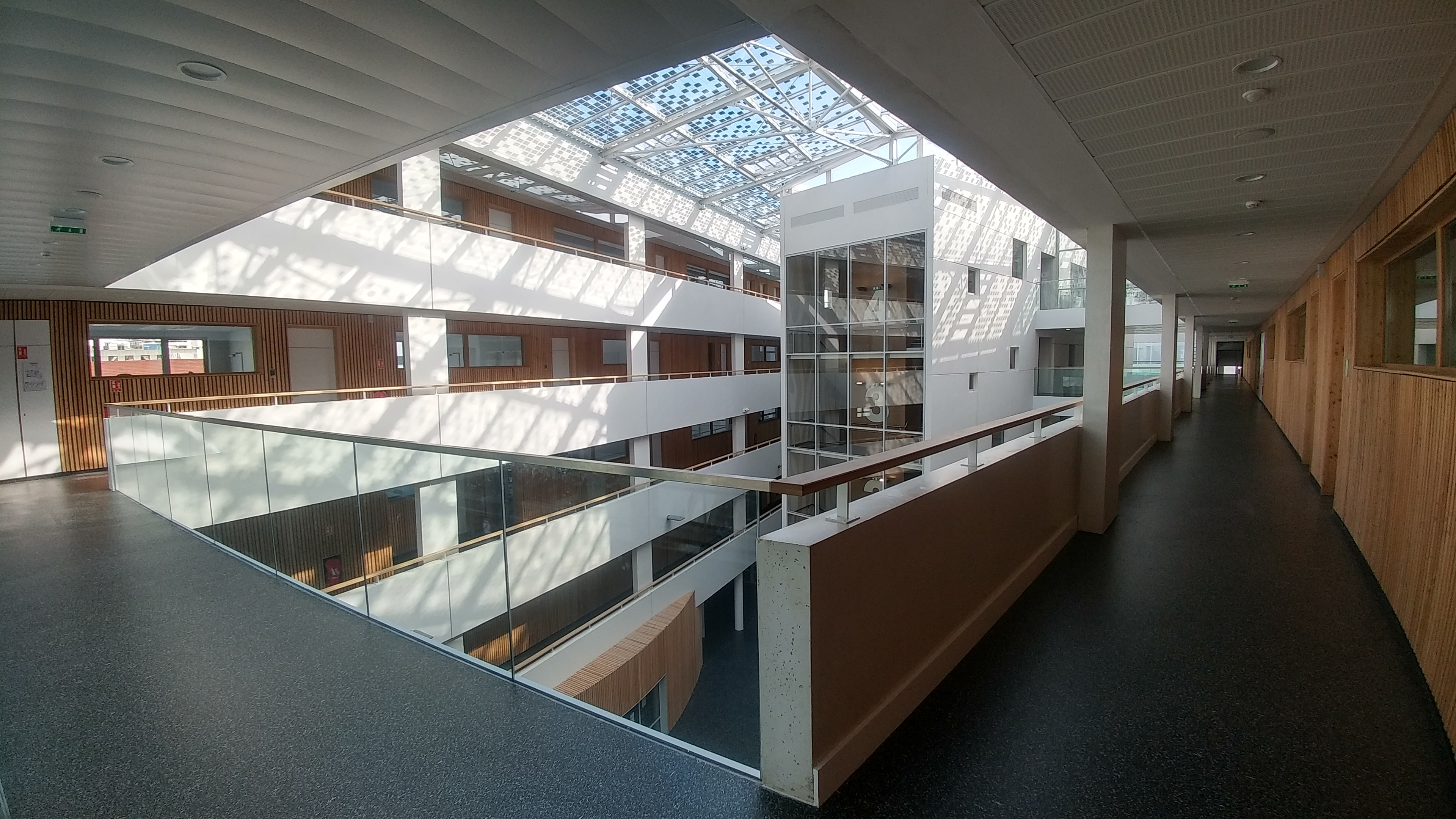 Intérieur du lycée Lucie Aubrac